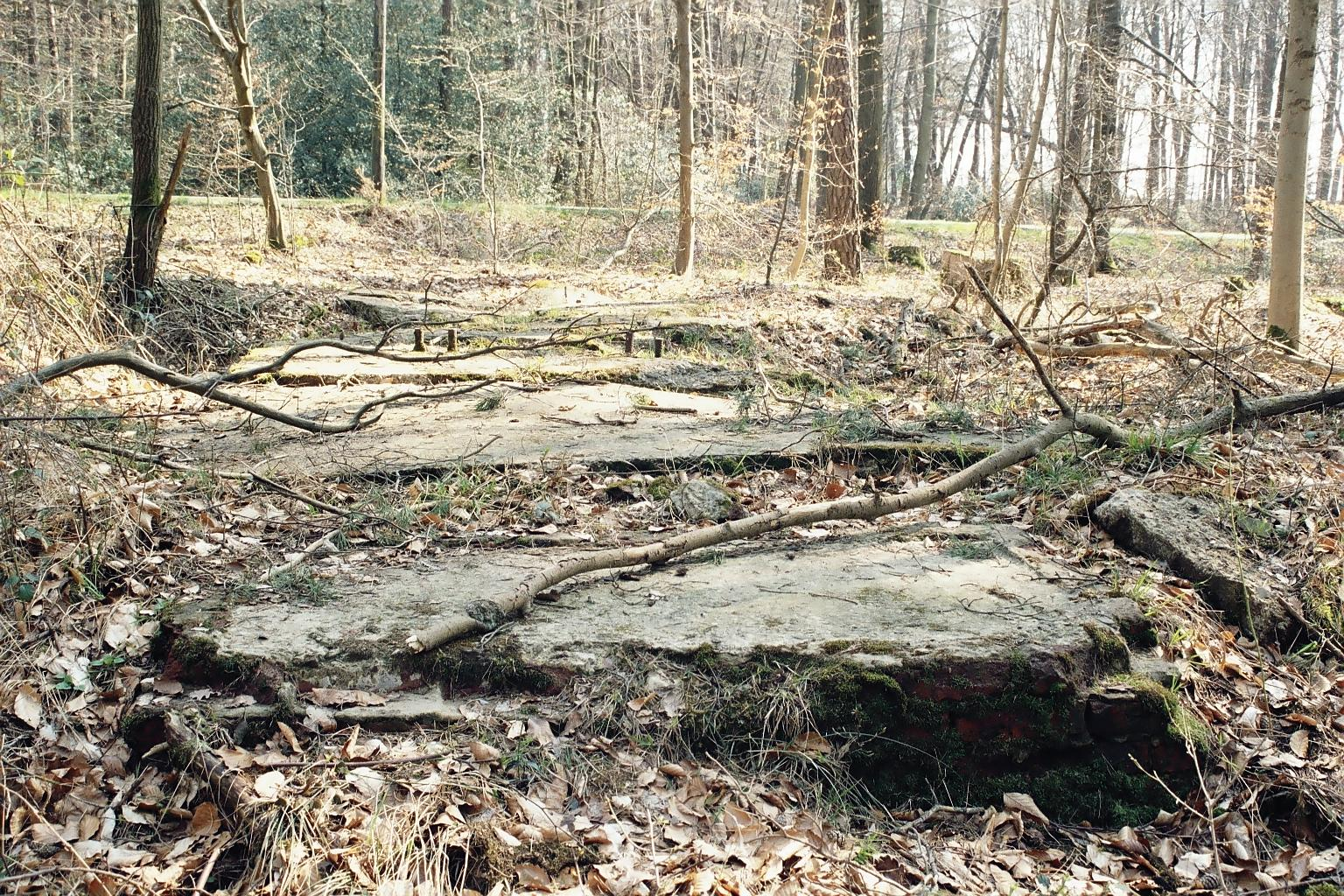 V1-Stellung im Nutscheid, Ruppichteroth, Reste des Hauptfundamentes, im Hintergrund die Landesstraße 86